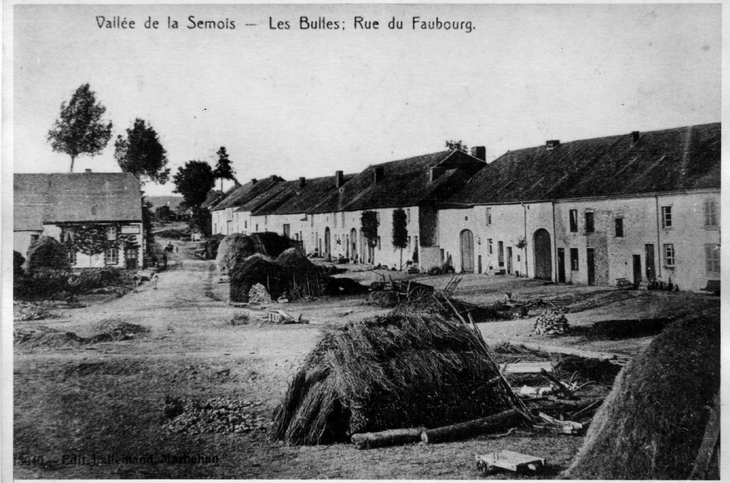 La rue du Faubourg aux Bulles (Chiny, Belgique). L'usoir est la partie utilisée devant la maison pour placer le fumier ou pour réaliser certaines activités agricoles.